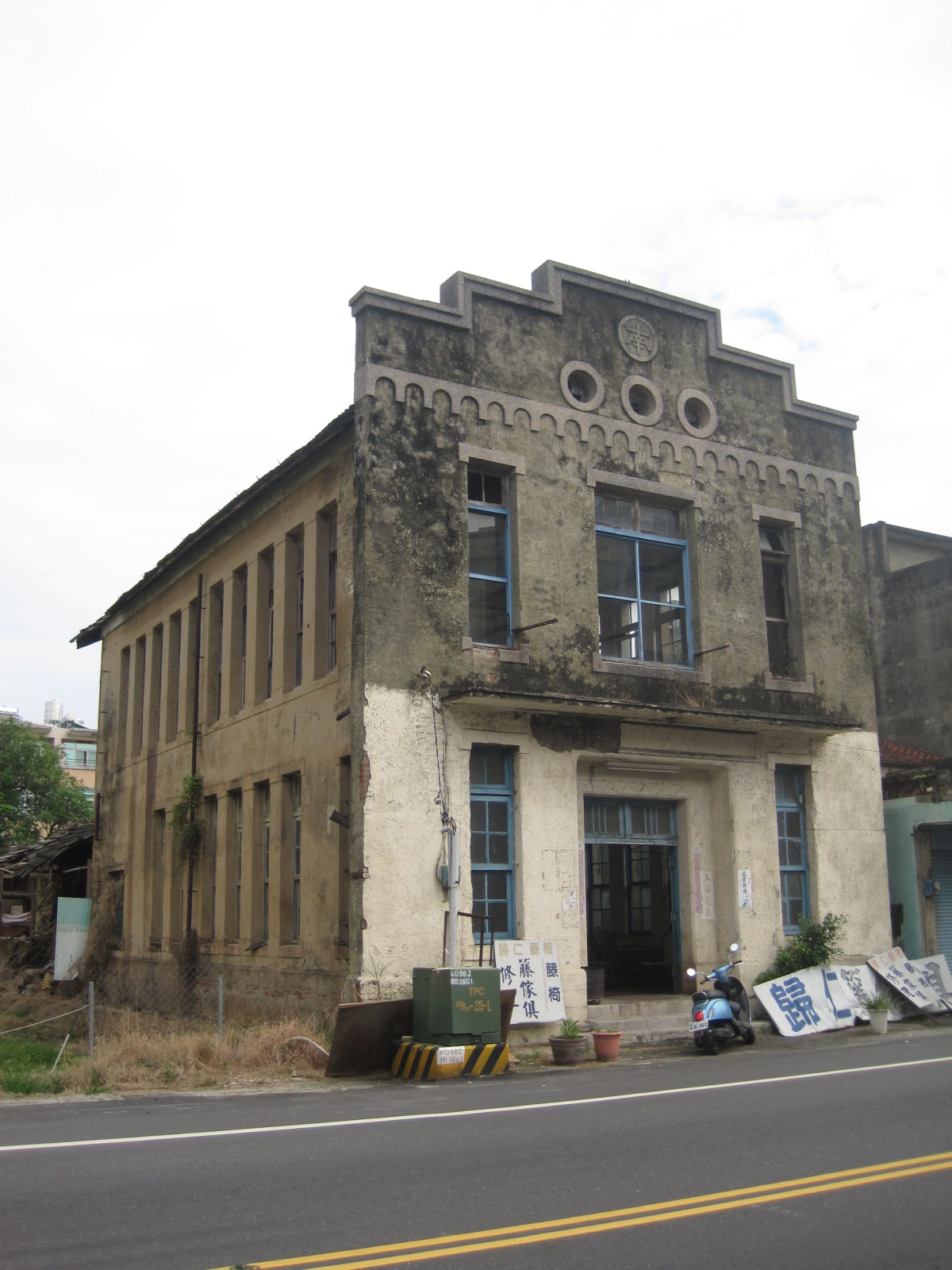 原保證責任歸仁信用購買販賣利用組合辦公廳舍，此為受地震影響前所拍攝的照片。